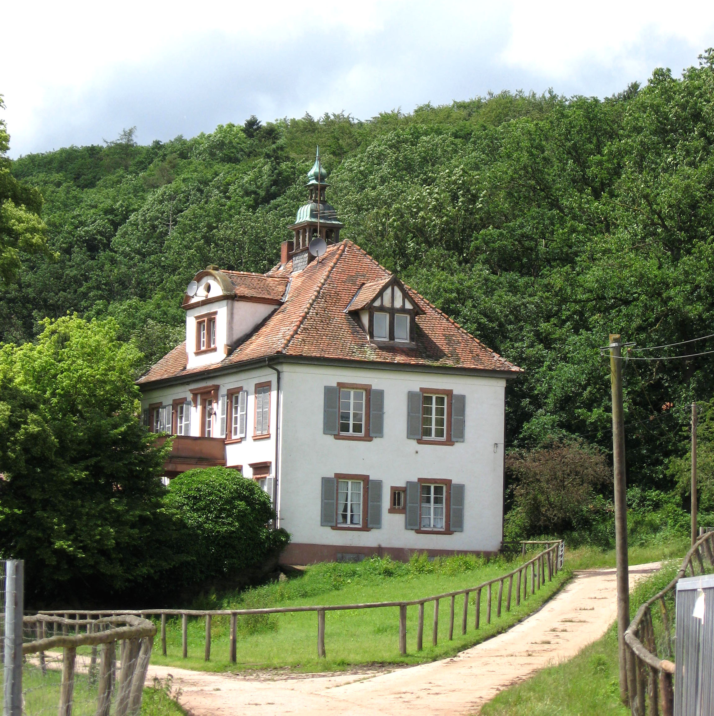 Rothenhof_Graefenhausen.jpg